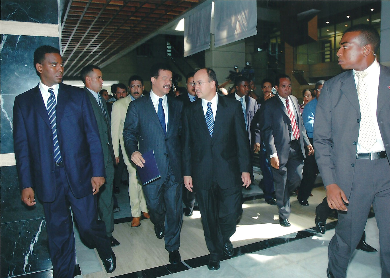 Francisco Domínguez Brito en la inauguración del Palacio de Justicia de Santo Domingo, 5 de enero de 2005.